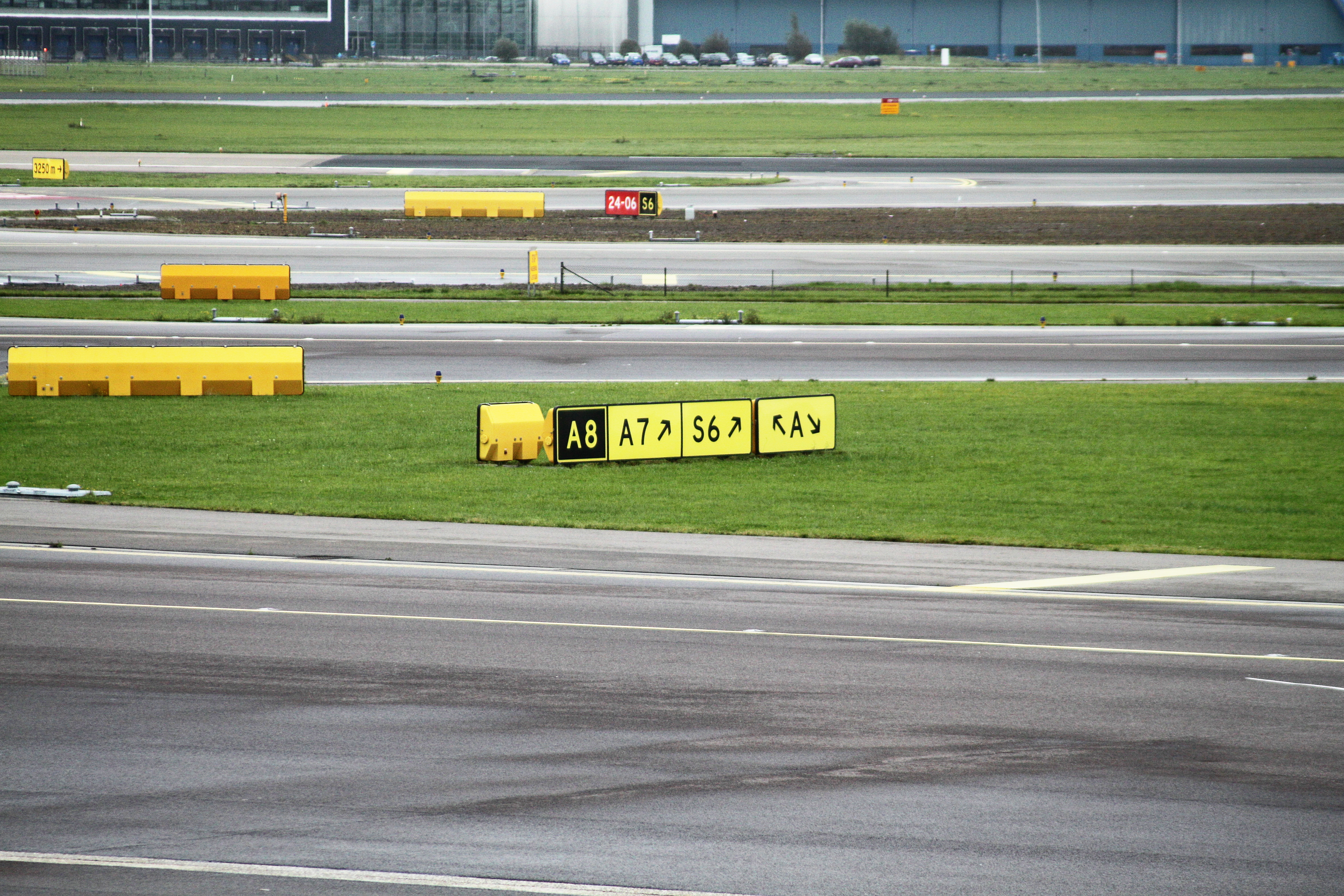 Flughafen Schiphol, Amsterdam